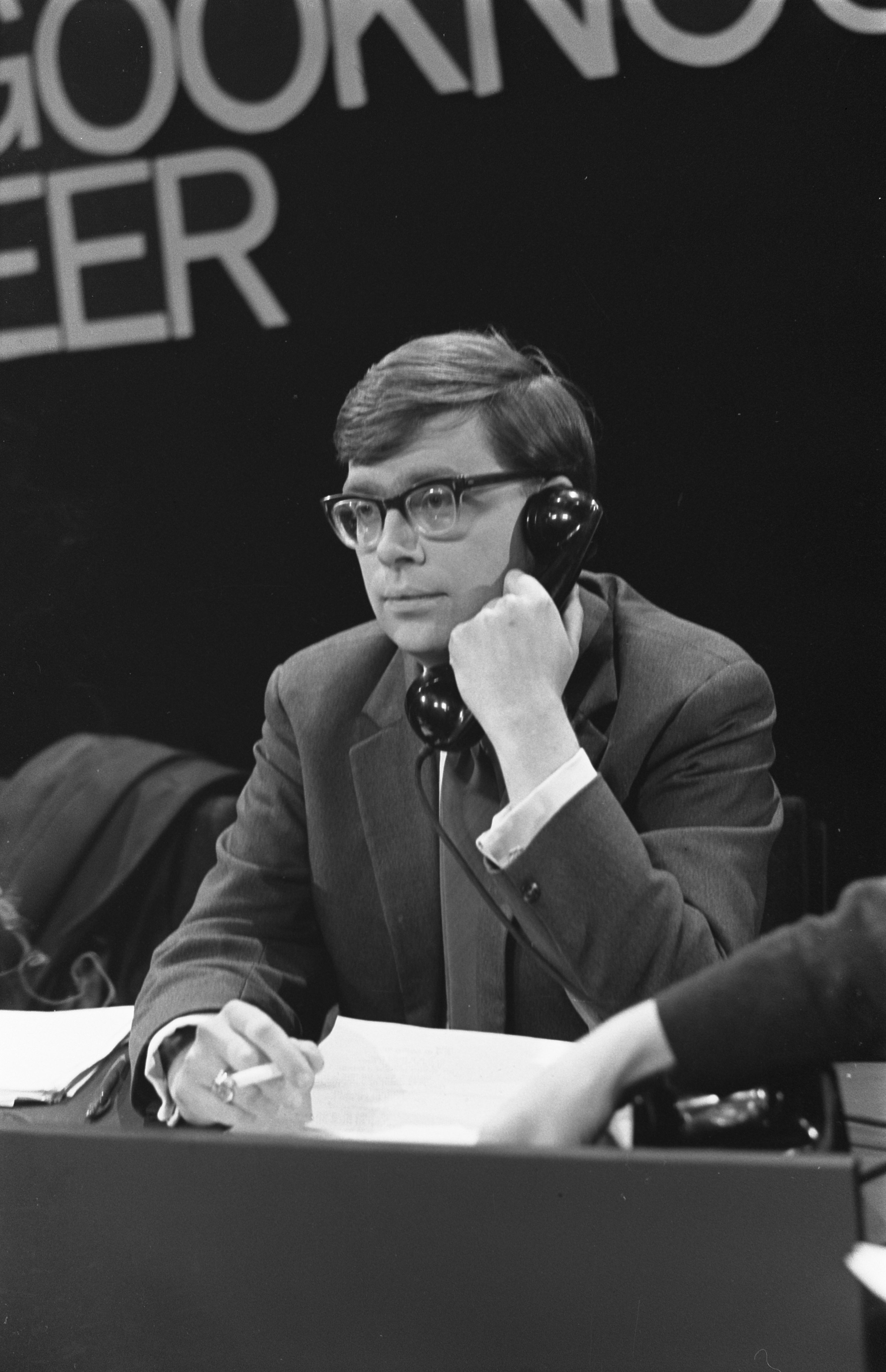 Collectie / Archief : Fotocollectie Anefo Reportage / Serie : [ onbekend ] Beschrijving : Programma "Zo is het toevallig ook nog een keer" van de VARA Datum : 7 december 1963 Trefwoorden : TV-programma's Persoonsnaam : Lohr, Peter Instellingsnaam : VARA Fotograaf : Bilsen, Joop van / Anefo Auteursrechthebbende : Nationaal Archief Materiaalsoort : Negatief (zwart/wit) Nummer archiefinventaris : bekijk toegang 2.24.01.05 Bestanddeelnummer : 915-8187